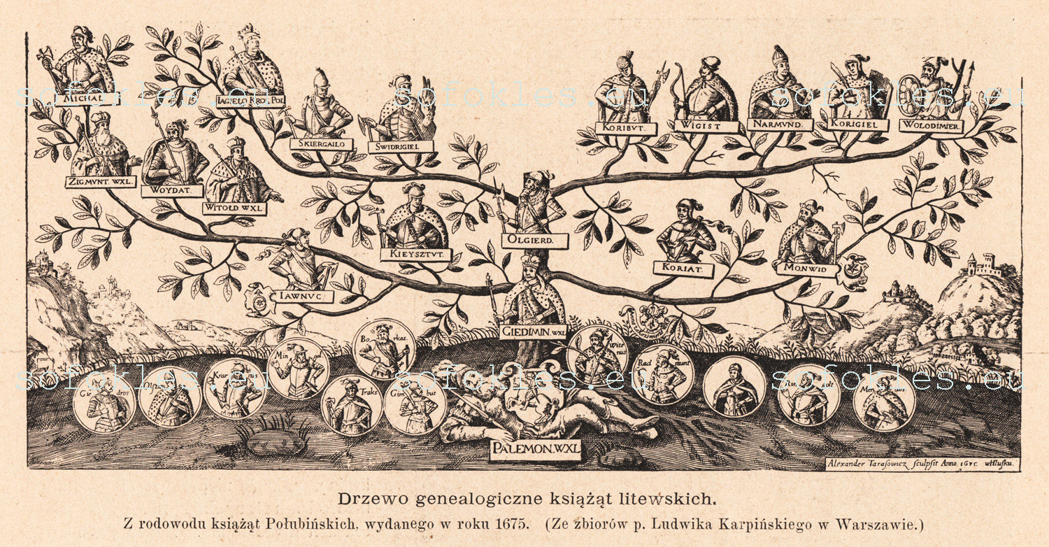 DRZEWO GENEALOGICZNE KSIĄŻĄT LITEWSKICH. LITWA XVII wiek